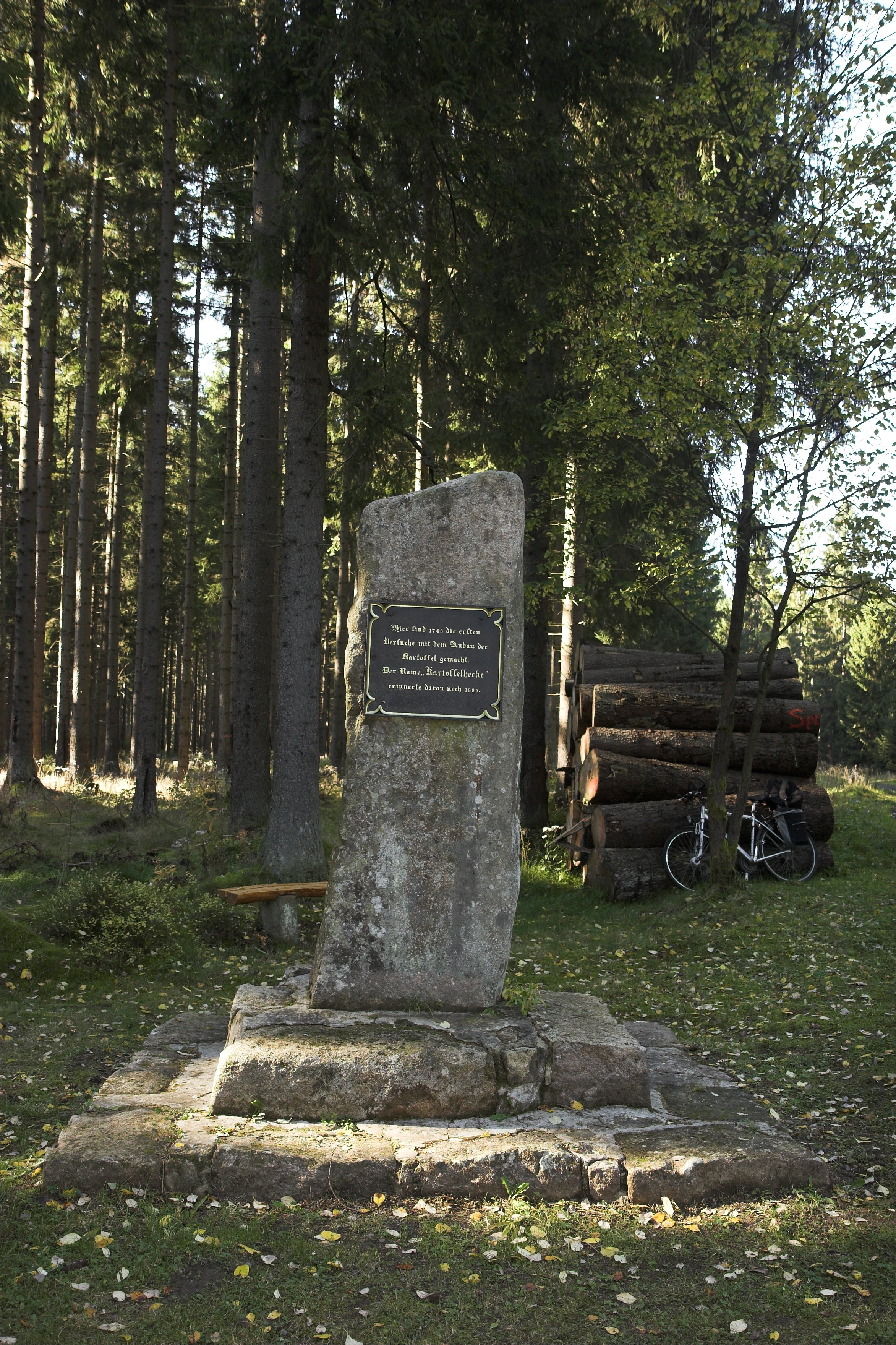 Das Kartoffeldenkmal im Wald südlich von Braunlage erinnert an den von Johann Georg von Langen initierten Kartoffelanbau im Harz.